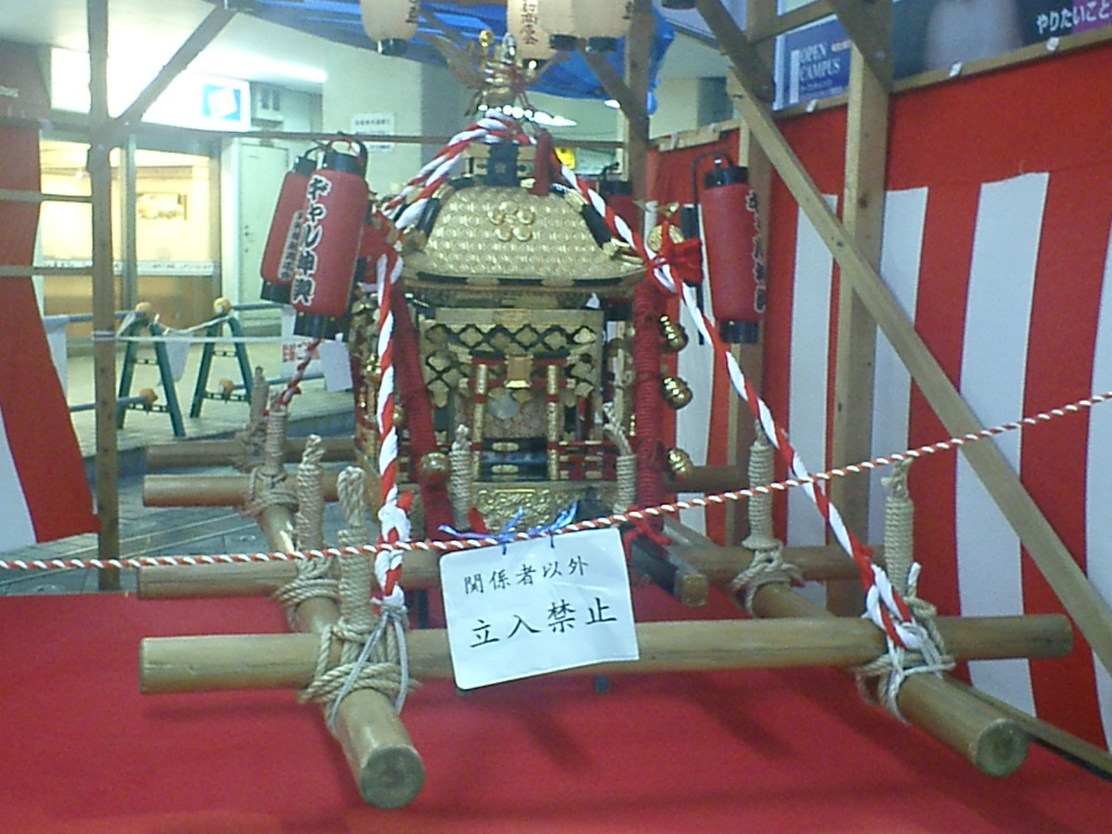 Osaka Tenjinmatsuri Gyaru-Mikoshi